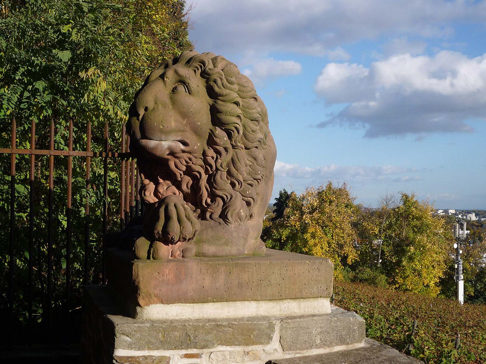 Linker Löwe auf der Löwenterrasse des Nerobergs mit Blick auf die Stadt Wiesbaden. (P1050843-h.)